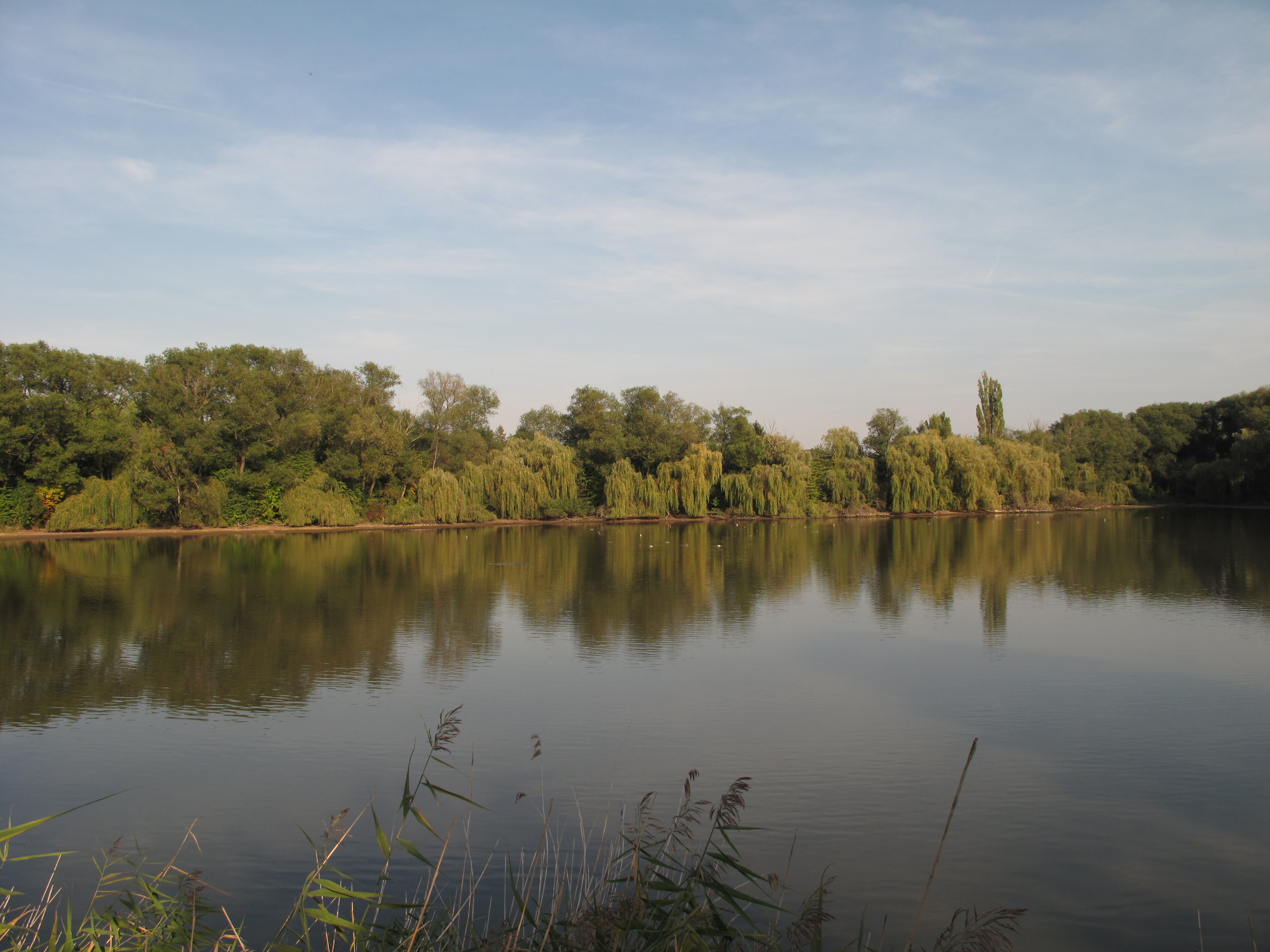 Xaverovský rybník II. Praha, Česká republika.